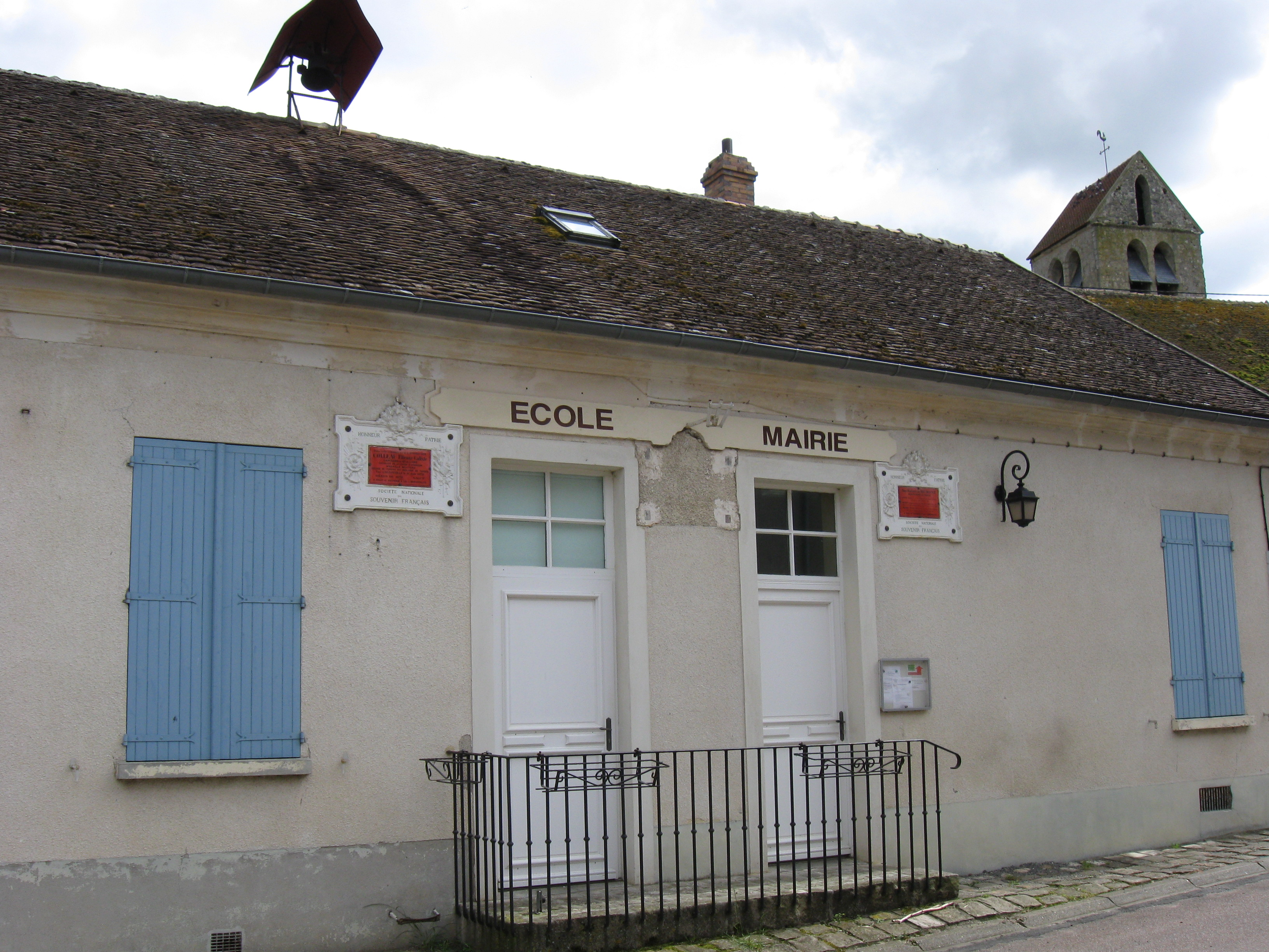 Mairie-école de Rumont. (département de la Seine et Marne, région Île-de-France).